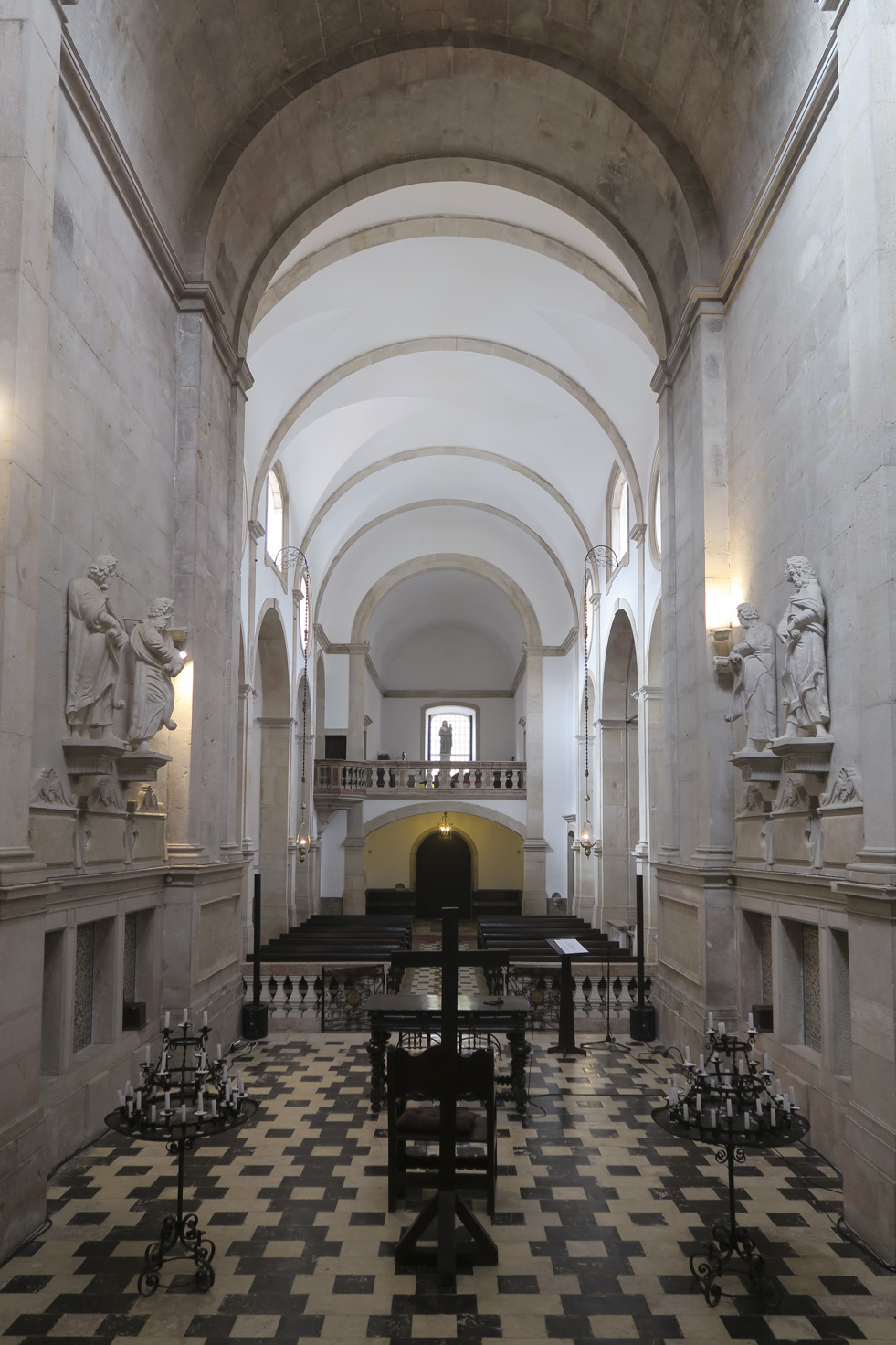 Igreja da Penha Longa, Sintra